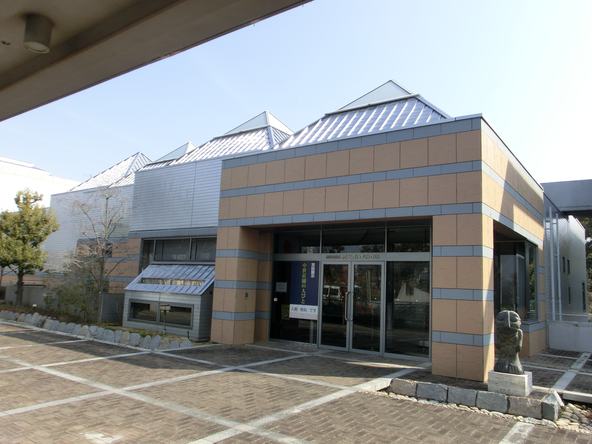 歴史館いずみさの